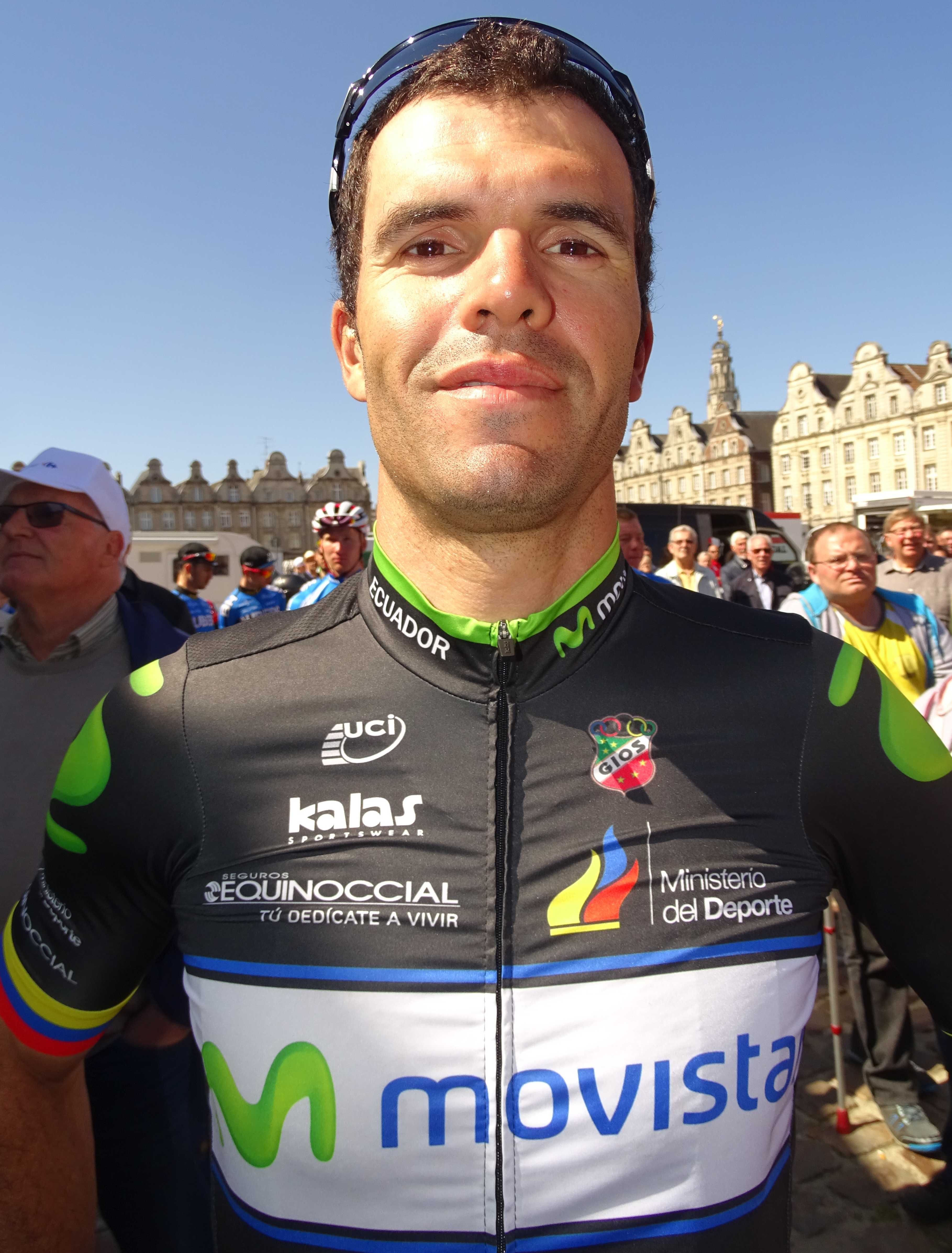 Reportage réalisé le dimanche 24 mai 2015 à l'occasion du départ et de l'arrivée de la troisième étape du Paris-Arras Tour 2015 à Arras, Pas-de-Calais, Nord-Pas-de-Calais, France. Depicted person: Jaume Rovira Depicted team: Ecuador